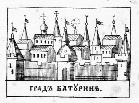 Краєвид Батурина, лубок початку 18 ст.